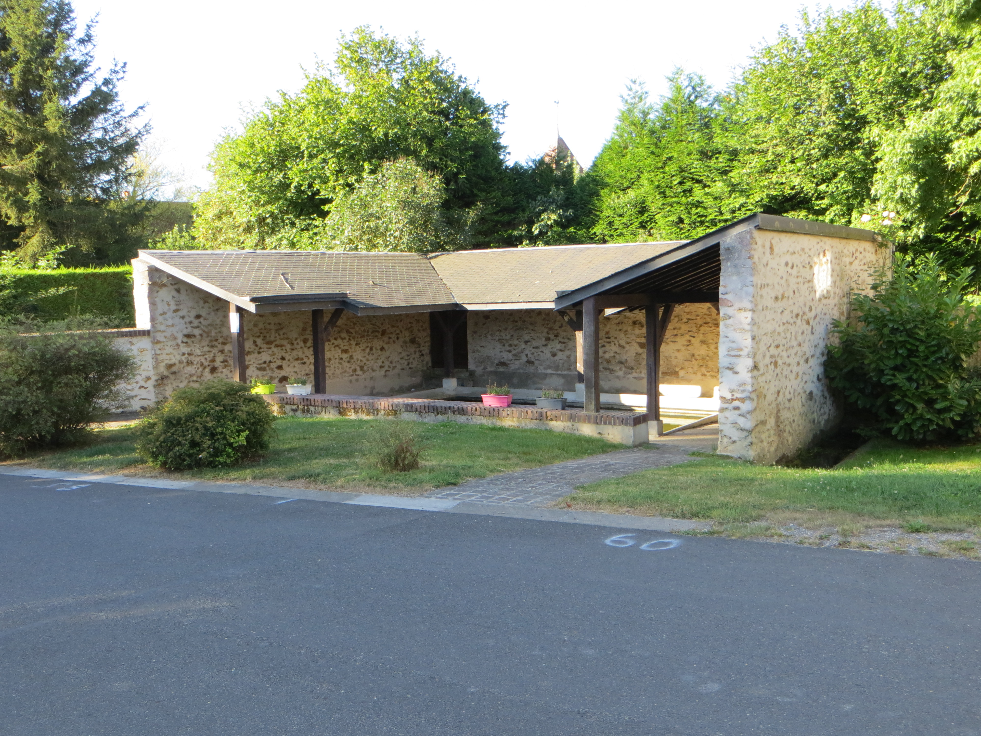 Lavoir